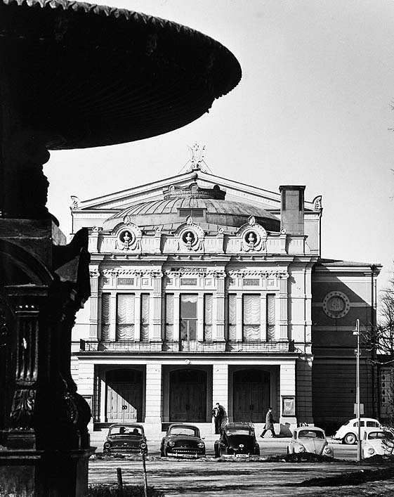 Bilden troligen från 1960-talets början. Motiv: Gävle teater Nyckelord: Byggnadsminnen, Riksintressen Kategori: Teater Bilden troligen från 1960-talets början.